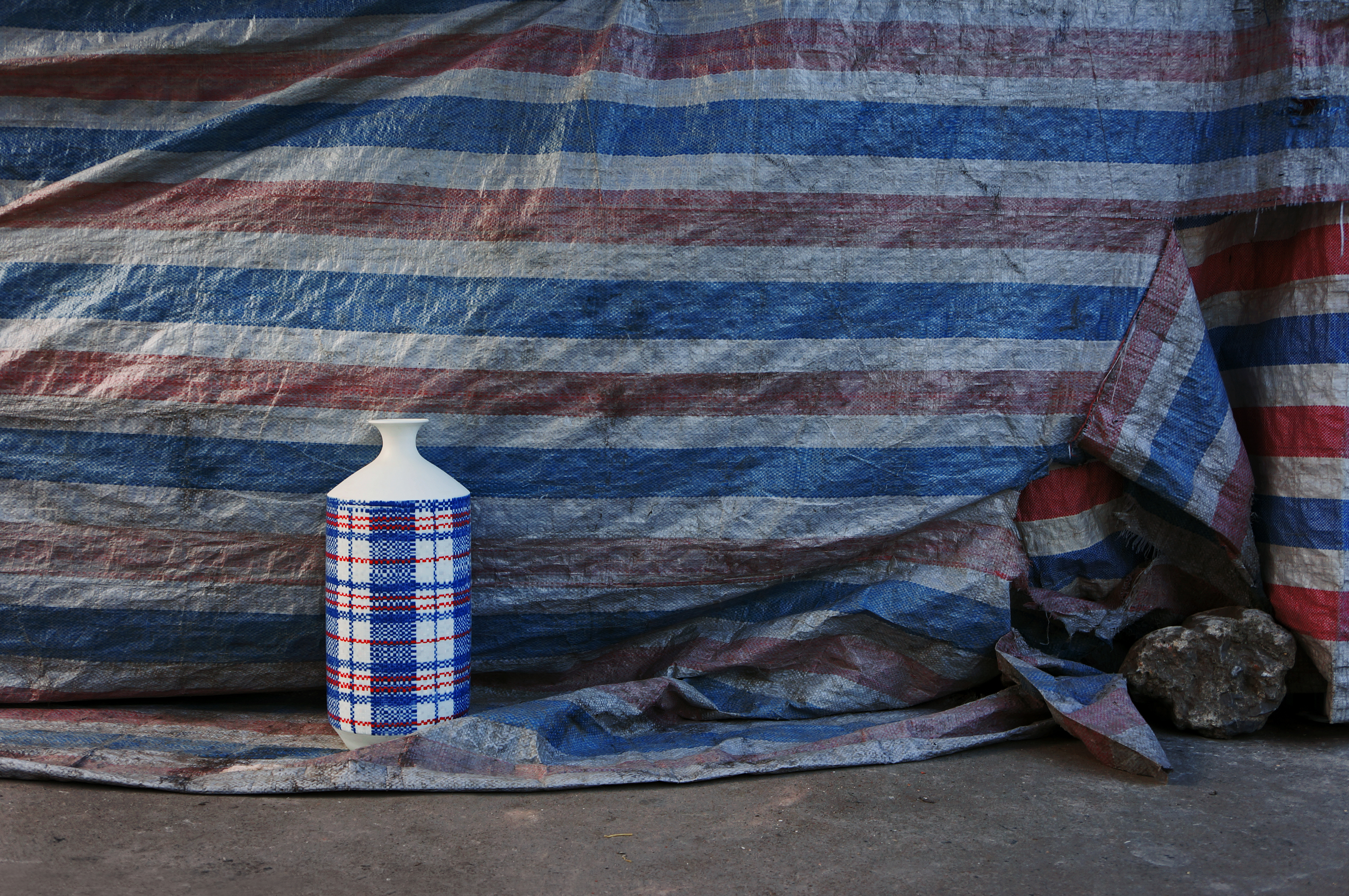 Karina Marusińska, "RWB", 2013, porcelana malowana naszkliwnie, 60 x 30 x 30 cm; realizacja w ramach projektu „Kaolin – Art and Design in Contemporary Ceramics” – Jingdezhen (Chiny); fot. Karina Marusińska